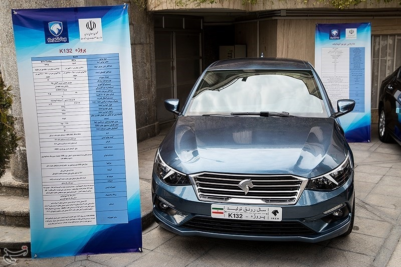 حجت‌الاسلام حسن روحانی رئیس‌جمهور در پایان جلسه امروز هیئت دولت از چهار خودرو تولید داخل در حیاط مجموعه نهاد ریاست جمهوری رونمایی و بازدید کرد. خودروهای دنا پلاس توربو اتوماتیک و K۱۳۲ محصول شرکت ایران خودرو و دو محصول سدان و کراس‌اوور (نیم‌شاسی) تولیدی گروه سایپا با اتکا به مگاپلت‌فرم ایرانی SP۱۰۰ از جمله محصولات رونمایی شده هستند. بالای ۹۰ درصد قطعات این محصولات ساخت داخل است و در تولید آنها به استانداردهای روز دنیا، داشتن مصرف پایین سوخت و کمترین میزان آلودگی برای محیط زیست توجه شده است.